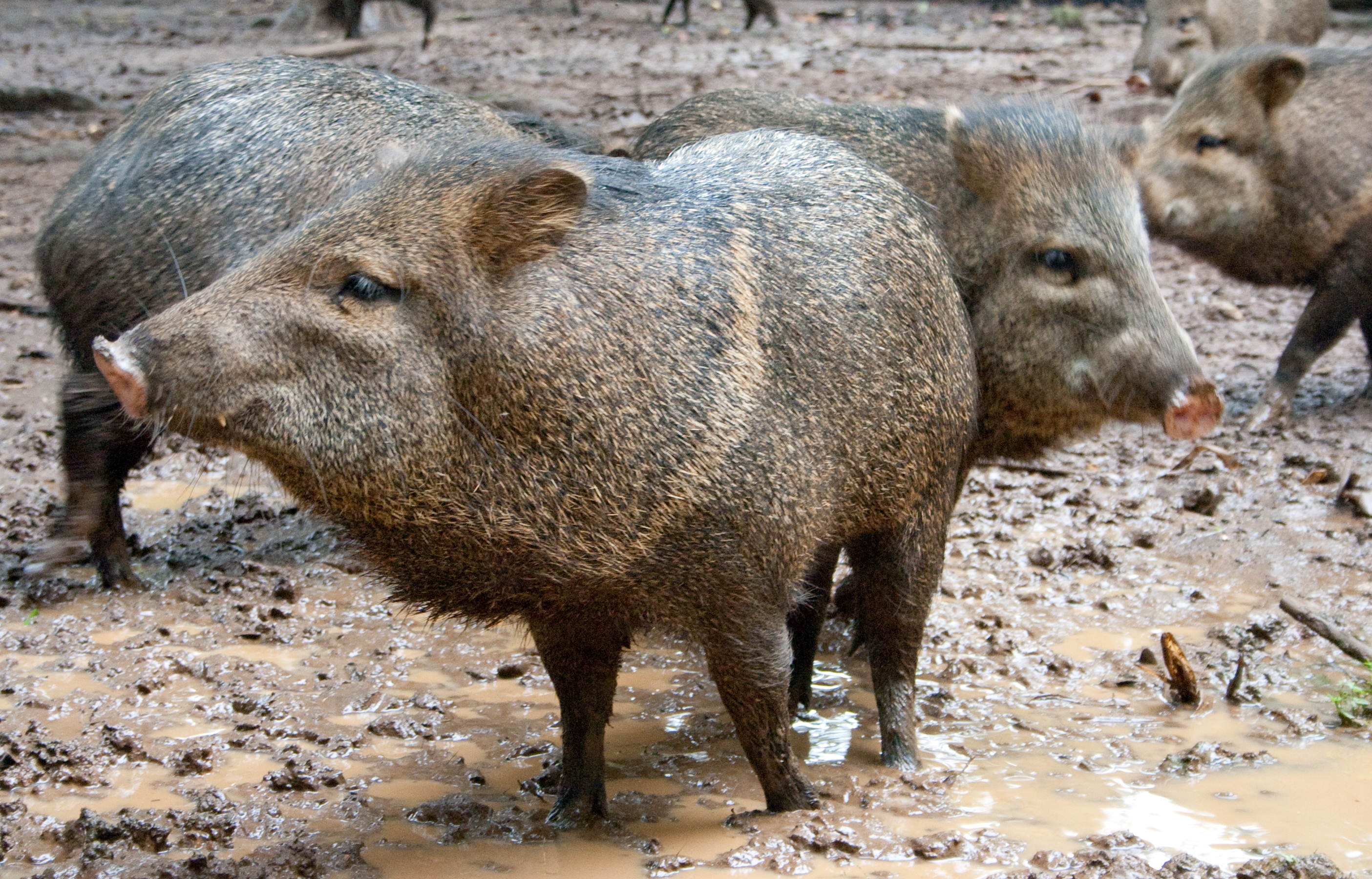 Collared Peccaries